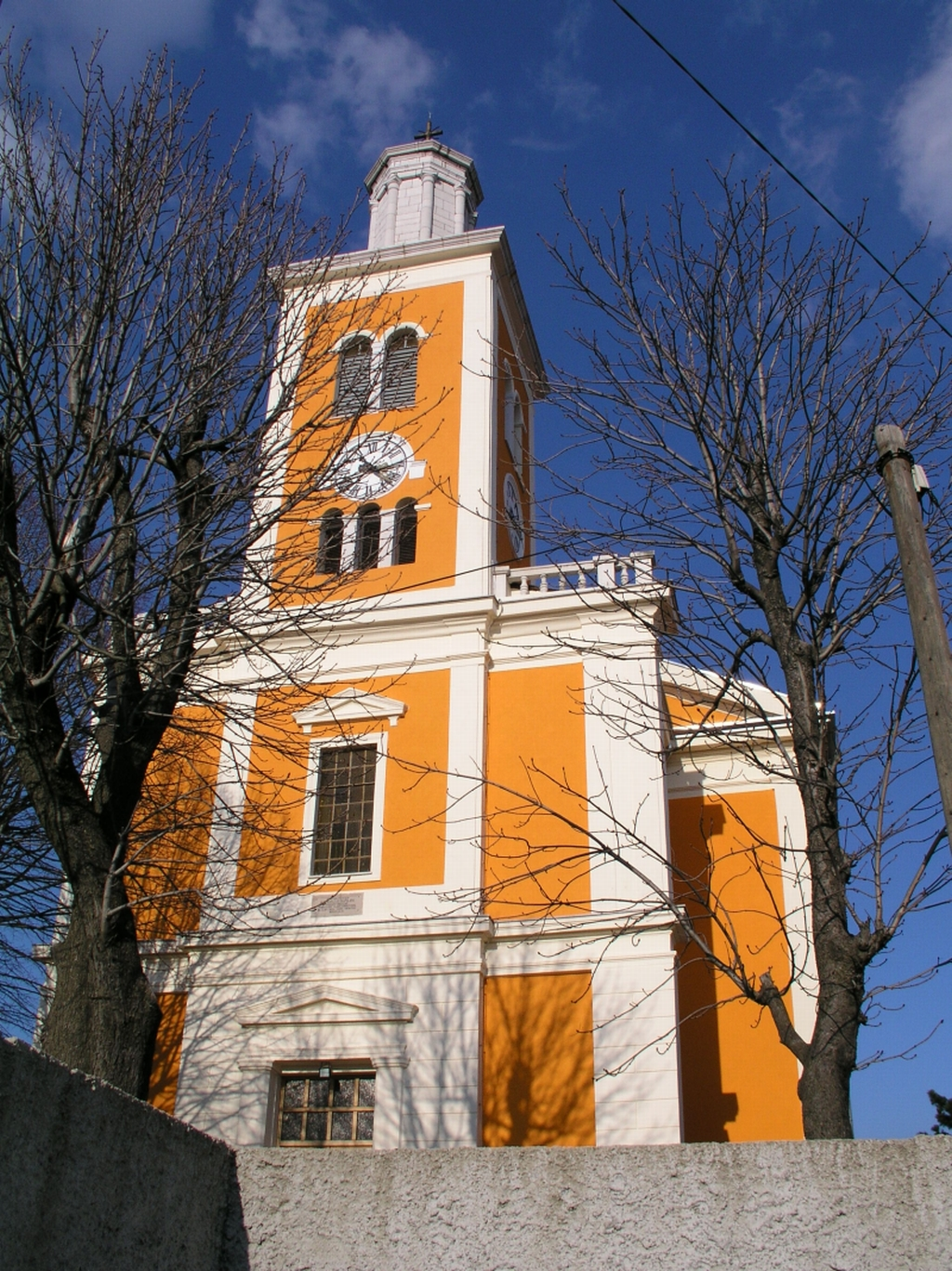 Crkva u Krasici, Hrvatska